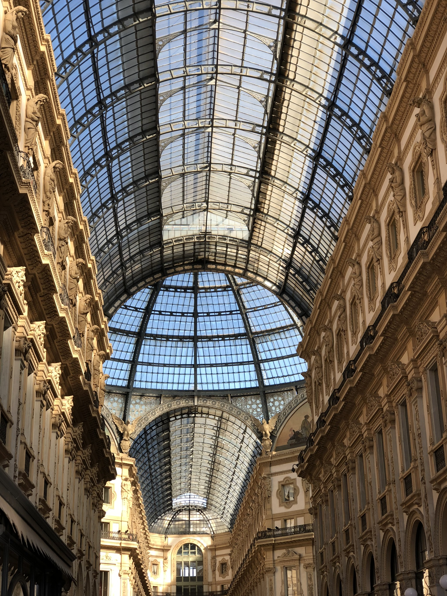 Galleria Vittorio Emanuele II This is a photo of a monument which is part of cultural heritage of Italy.